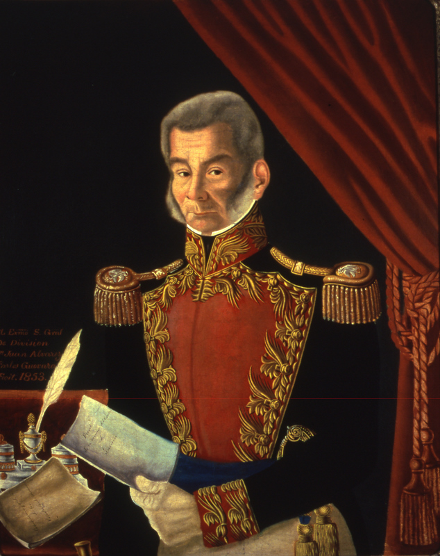 General Juan Álvarez (1790-1867), viejo insurgente que encabezó la revolución de Ayutla contra Santa Anna en 1854.